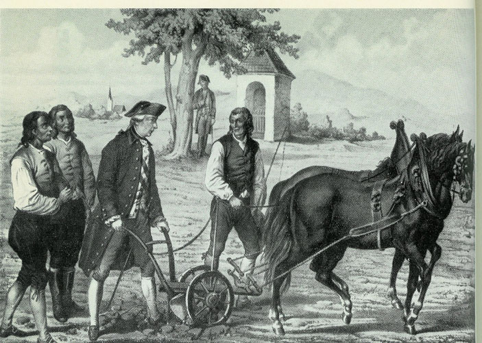 Kaiser Joseph II. führt den Pflug; das als "Furchenzug" bekannt gewordene Ereignis fand 1769 im mährischen Slawikowitz statt. Während seine Kutsche am Weg repariert werden musste, half der Kaiser dem Bauer Andreas Trnka und dessen Knecht Jan Kartoš beim Pflügen.